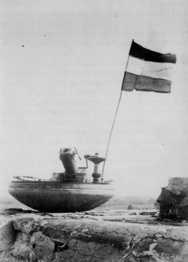 Fort XIII Twierdzy Przemyśl - wieża pancerna haubicy 15 cm M.94